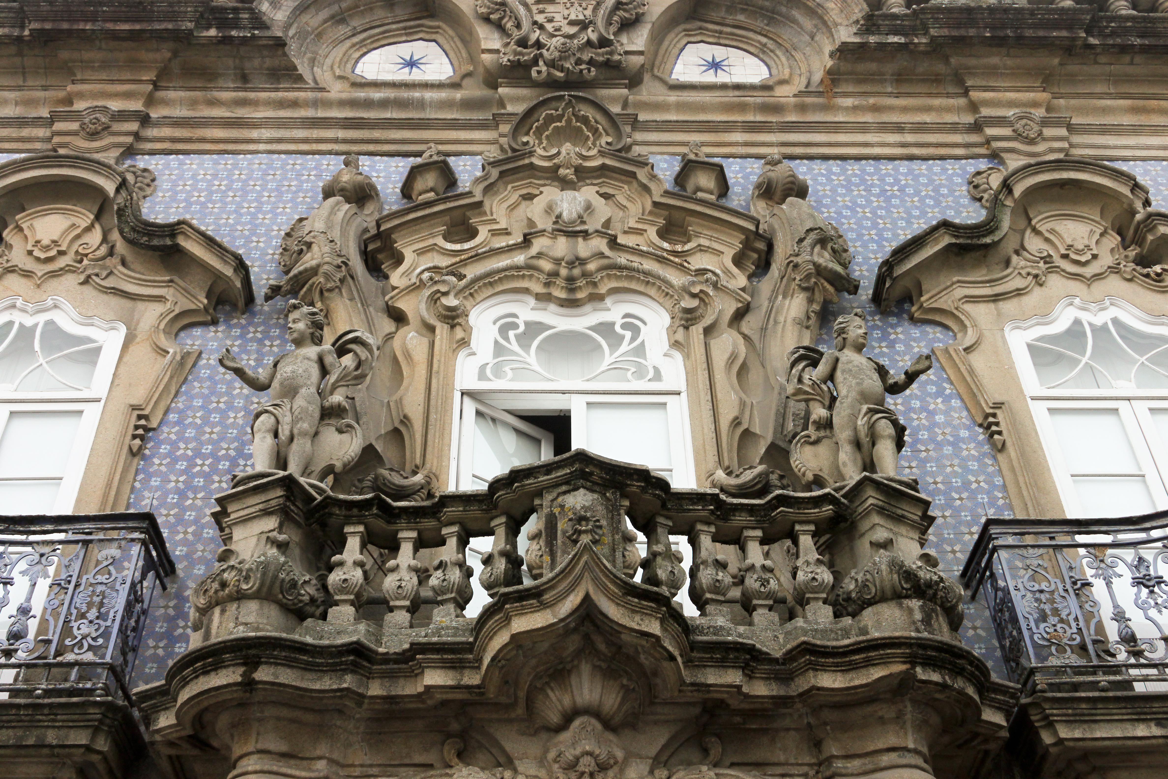 O Palácio do Raio, ou Casa do Mexicano é um palácio, construído em 1754-55. Projecto do arquitecto André Soares This file was uploaded for Wiki Loves Monuments in Portugal with the unique identifier 74588.